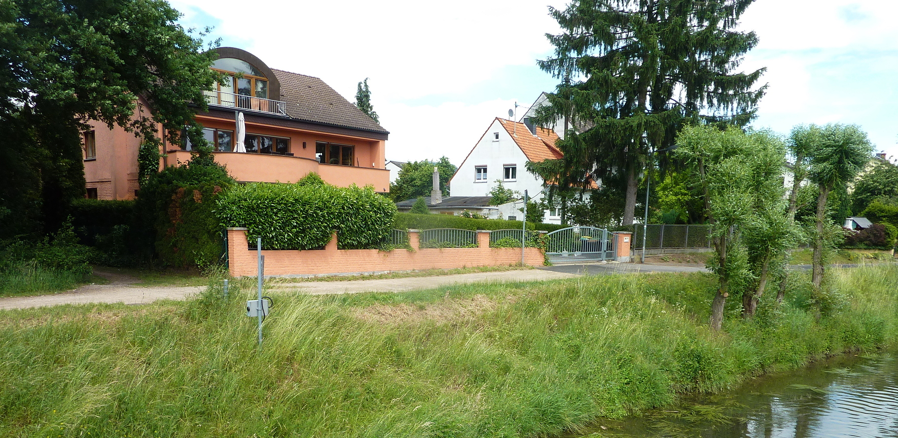 Frankfurt am Main, Stadtteil Sossenheim: Im Mittleren Sand (Straßenname) oder Sossenheim III (amtliche Bezeichnung) ist eine Wohnsiedlung am südwestlichen Rand der Gemarkung, im Süden des Sossenheimer Unterfelds. Die Siedlung stößt im Westen an den Unterlauf des Sulzbachs, der dort die Grenze zum Nachbarstadtteil Frankfurt-Höchst markiert, im Süden an das rechte Ufer des Flusses Nidda und im Norden und Osten an landwirtschaftlich genutzte Flächen des Frankfurter Grüngürtels. Im Bild Wohnhäuser am südlichen Rand der Siedlung, aufgenommen von einer Fußgängerbrücke über die Nidda zwischen den Stadtteilen Sossenheim und Nied aus.